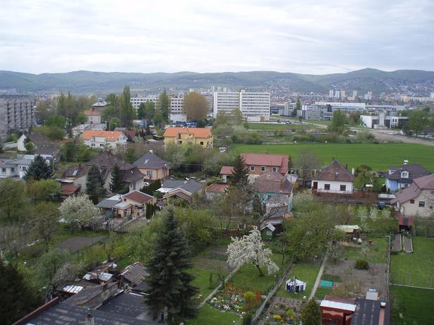 Východné (Rendez)